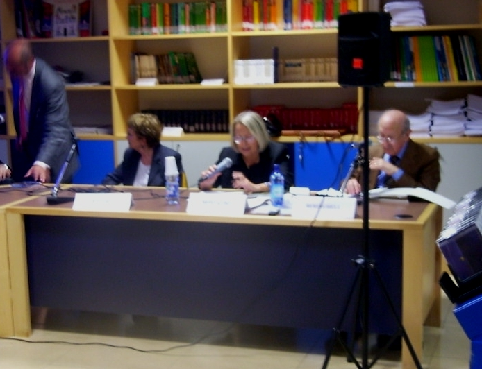 Chiusura delle Manifestazioni per il 150º anniversario della nascita del pittore Cesare Viazzi. Sala Biblioteca della Regione Liguria. 18 giugno 2008. Mio scatto. PD-Utente